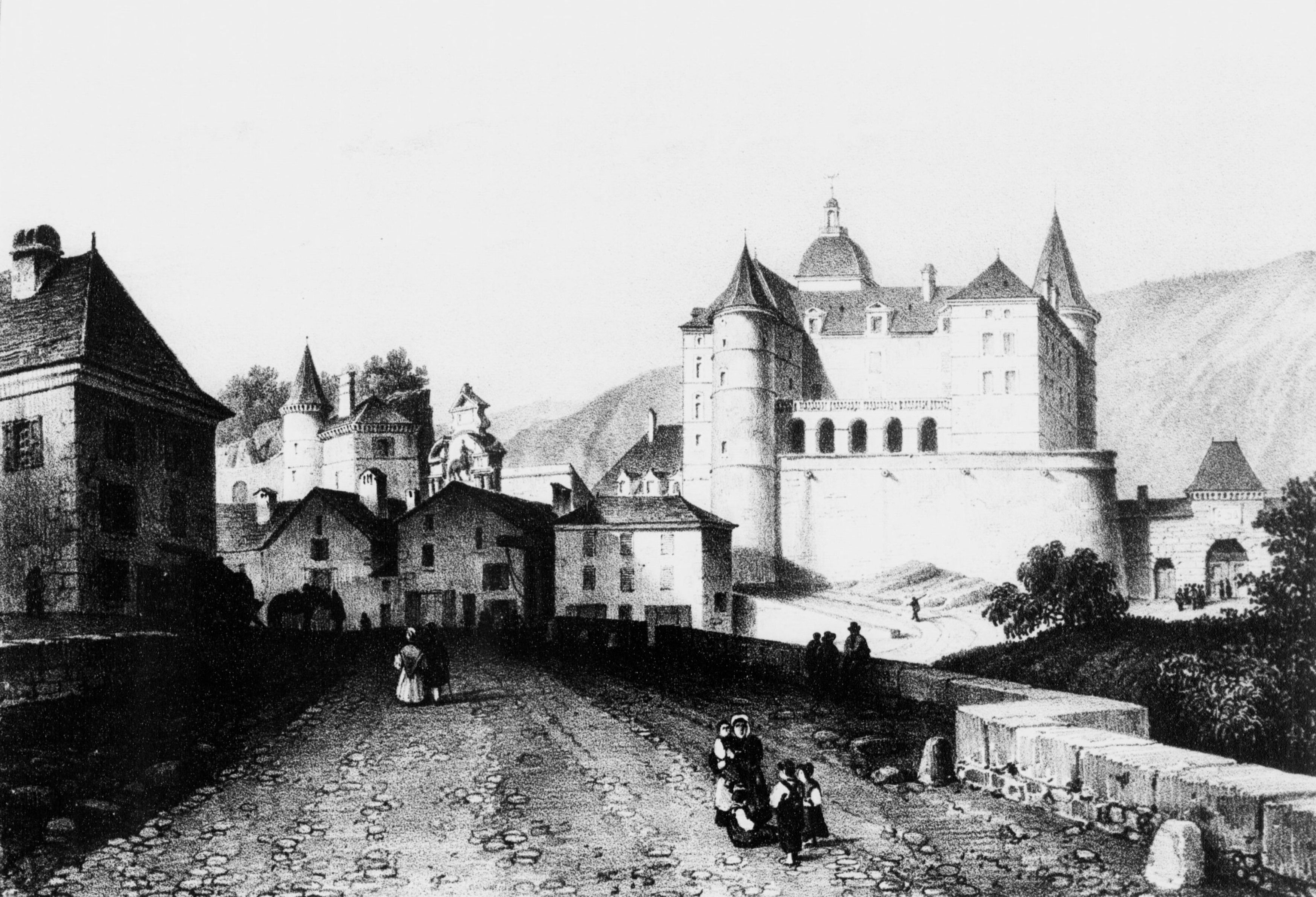 Album du Dauphiné, ou Recueil de dessins représentant les sites les plus pittoresques du Dauphiné.